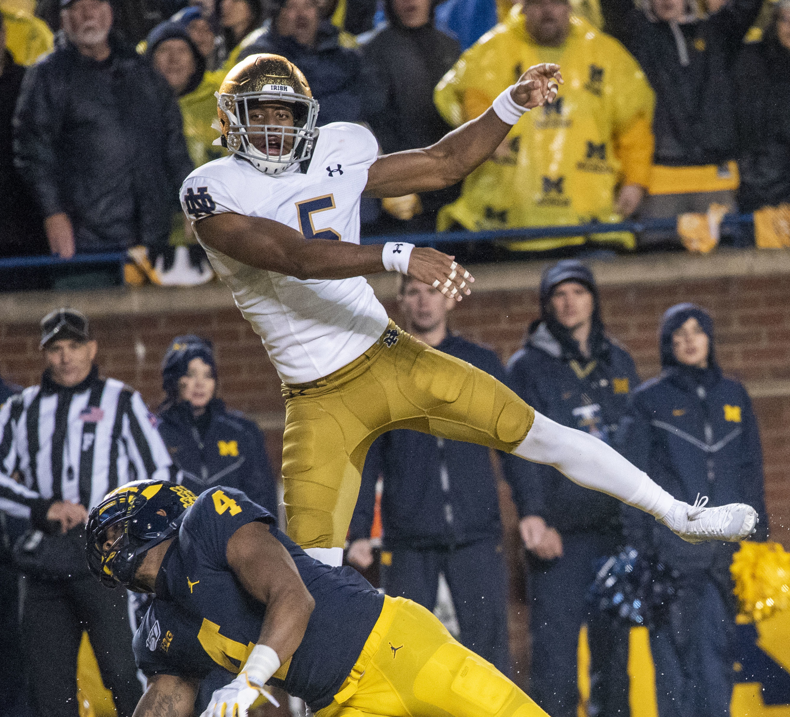 ND vs. UM_2437